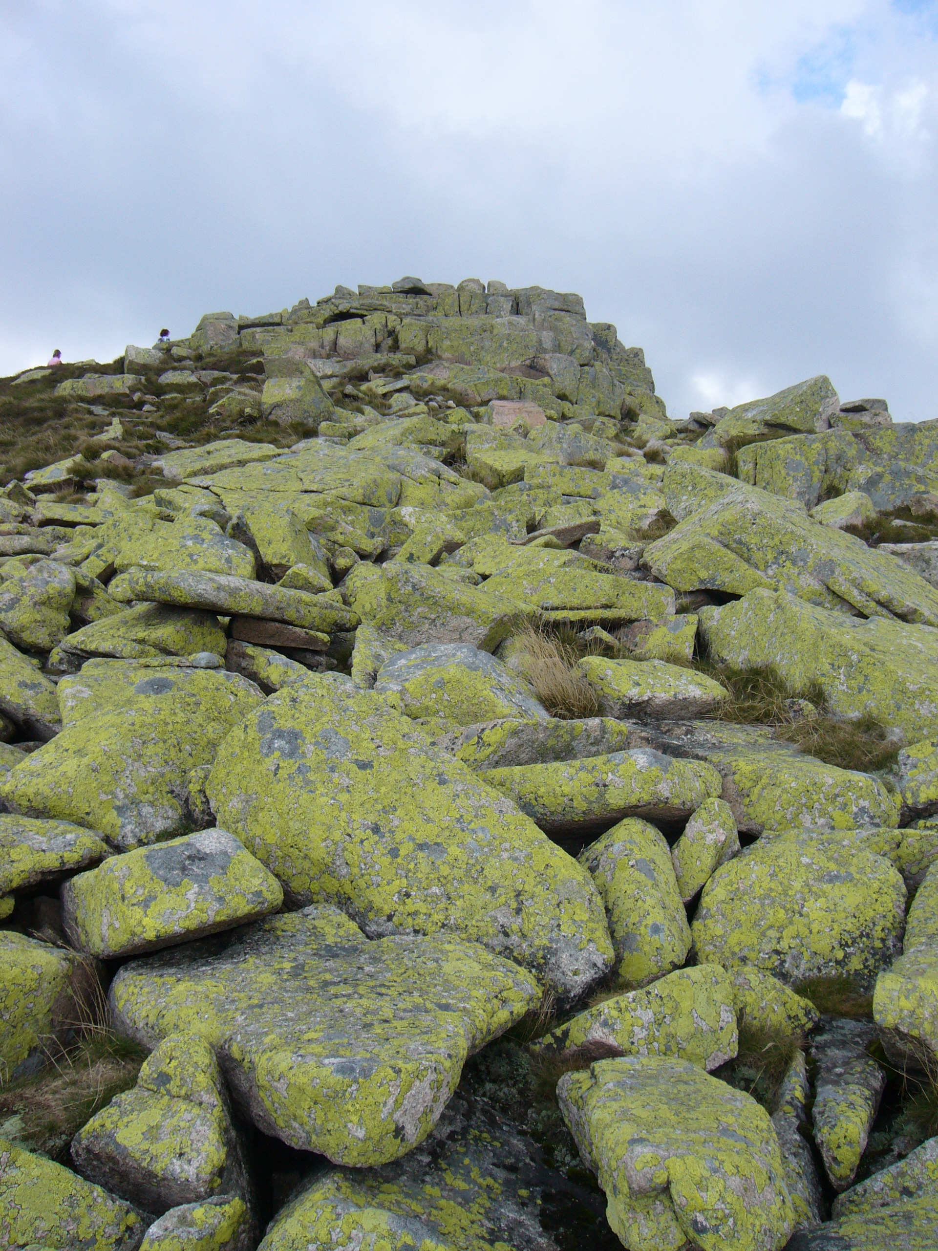 Gołoborze na Łabskim Szczycie